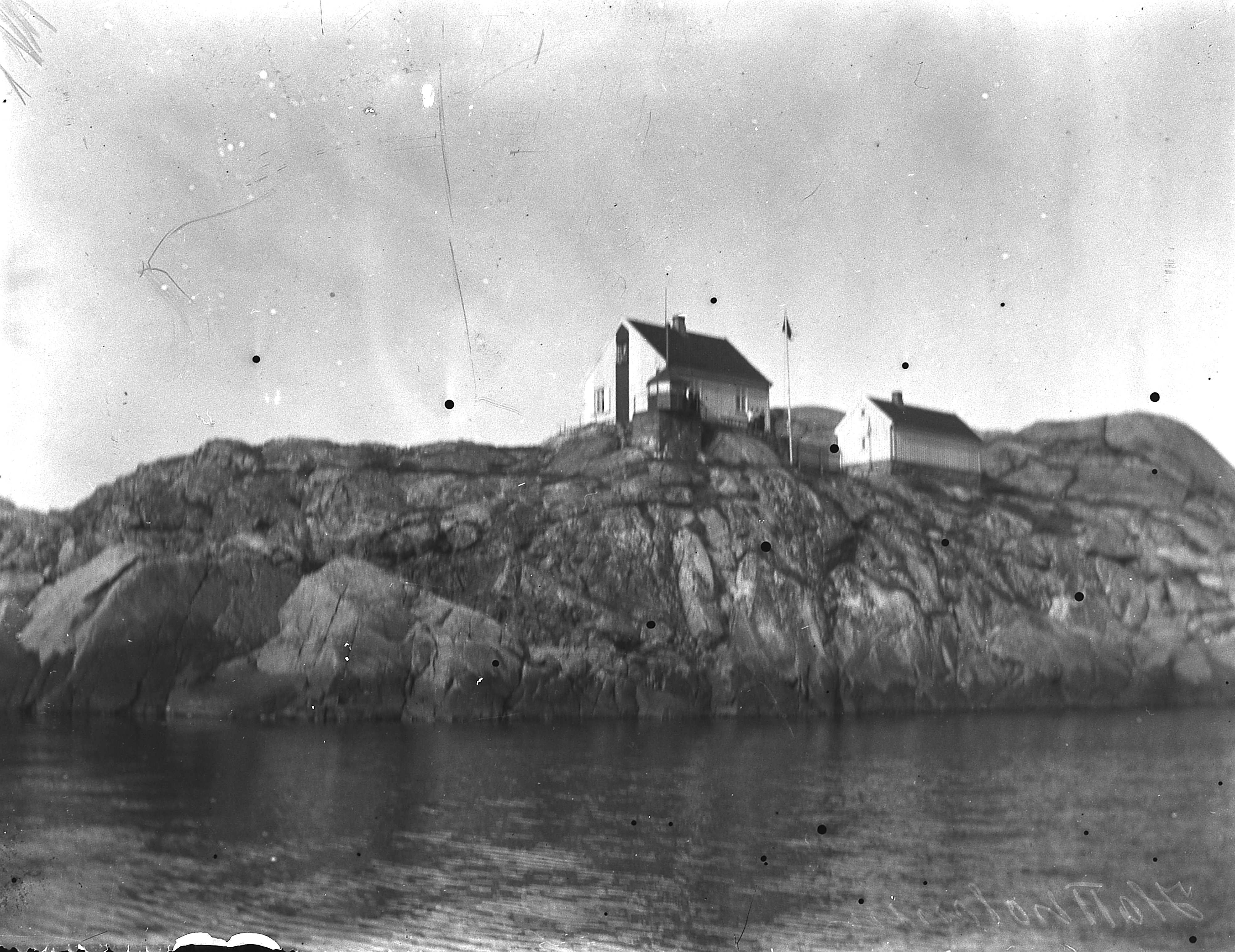 Bildet er hentet fra Arkivverket. Hatholmen, Mandal Arkivinstitusjon : Riksarkivet Arkivnavn : Fyrdirektoratet Sted : Norge, Vest-Agder, Mandal, Emneord: Fyr, Kyst Avbildet